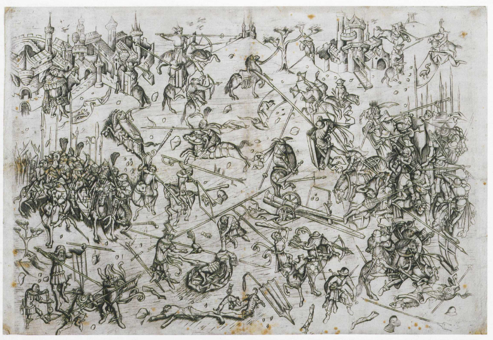 Kupferstich - Zeitgenössische Darstellung der Schlacht von Hiltersried am 21. September 1433: „Die Grosse Schlacht" Pfalzgraf Johann I. von Pfalz­-Neumarkt besiegt die Hussiten, Meister des Todes Mariä, Kupferstich, Paris, Louvre, Cabinet des dessins (Collection Rothschild) SK